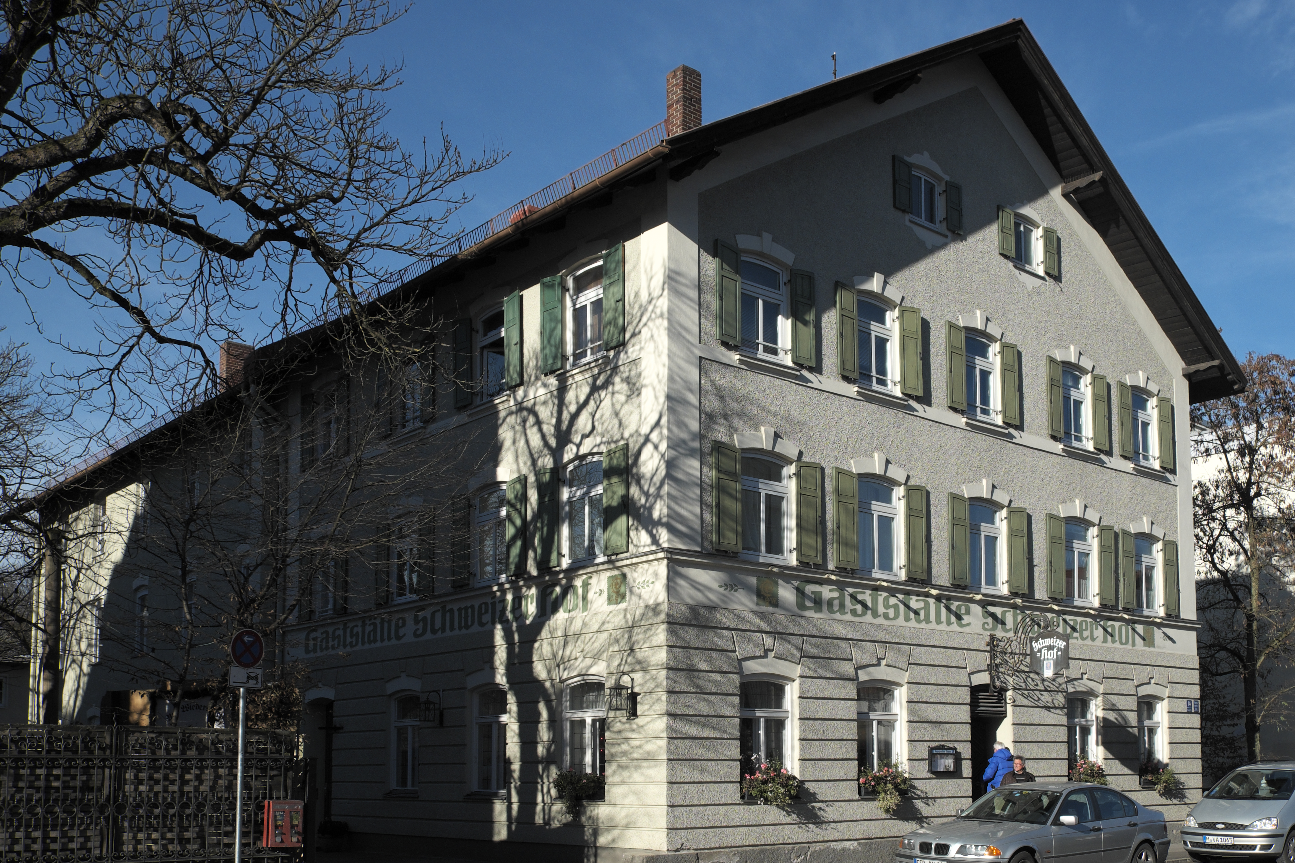 Gasthof in der Planegger Straße 14 in Pasing im Stadtbezirk Pasing-Obermenzing in München (Bayern/Deutschland)